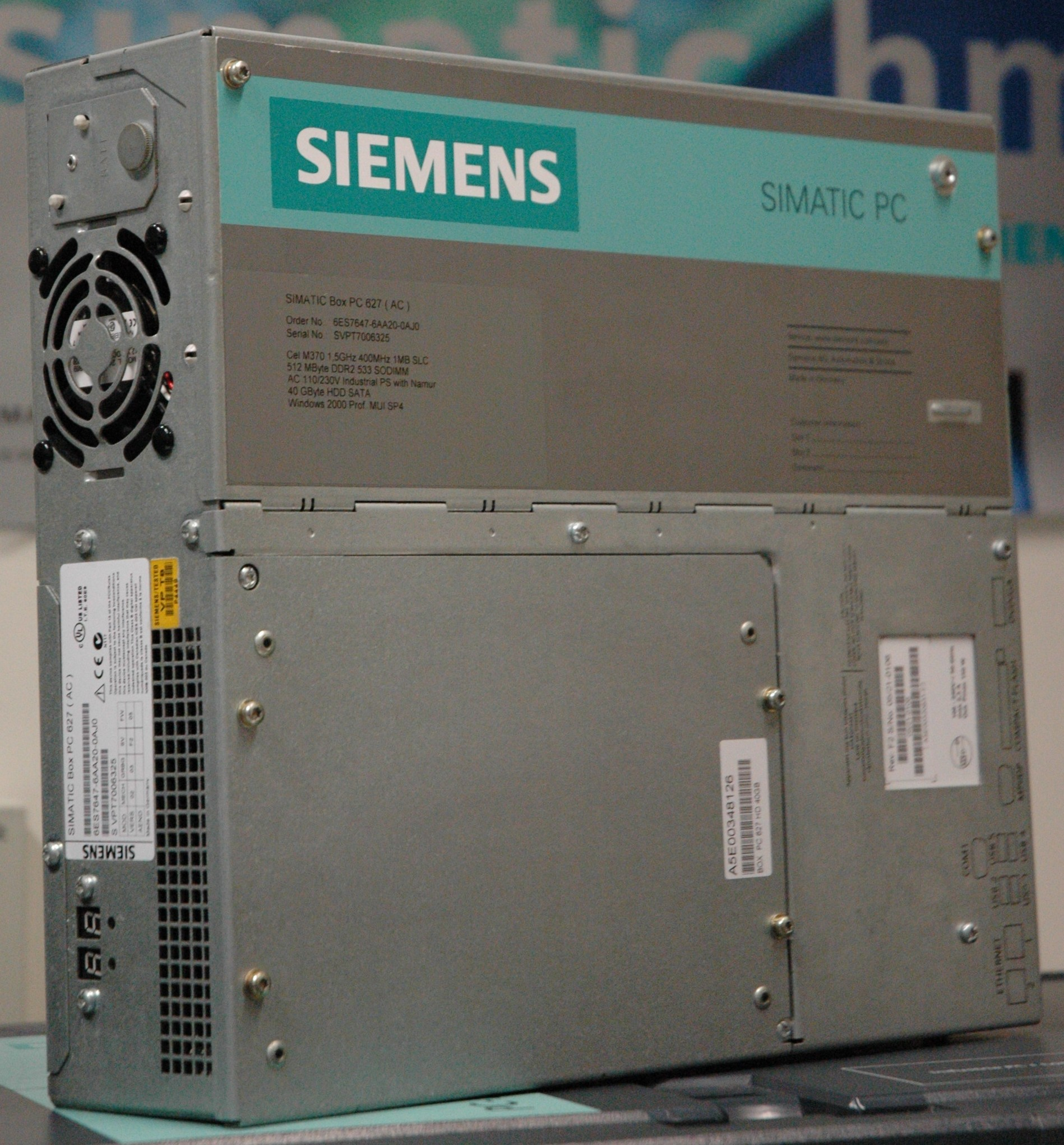 Siemens SIMATIC Box-PC 627